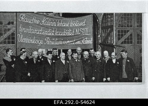 Митинг в честь переименования завода в Железнодорожный завод имени М. Калинина, Таллин, август 1940 года